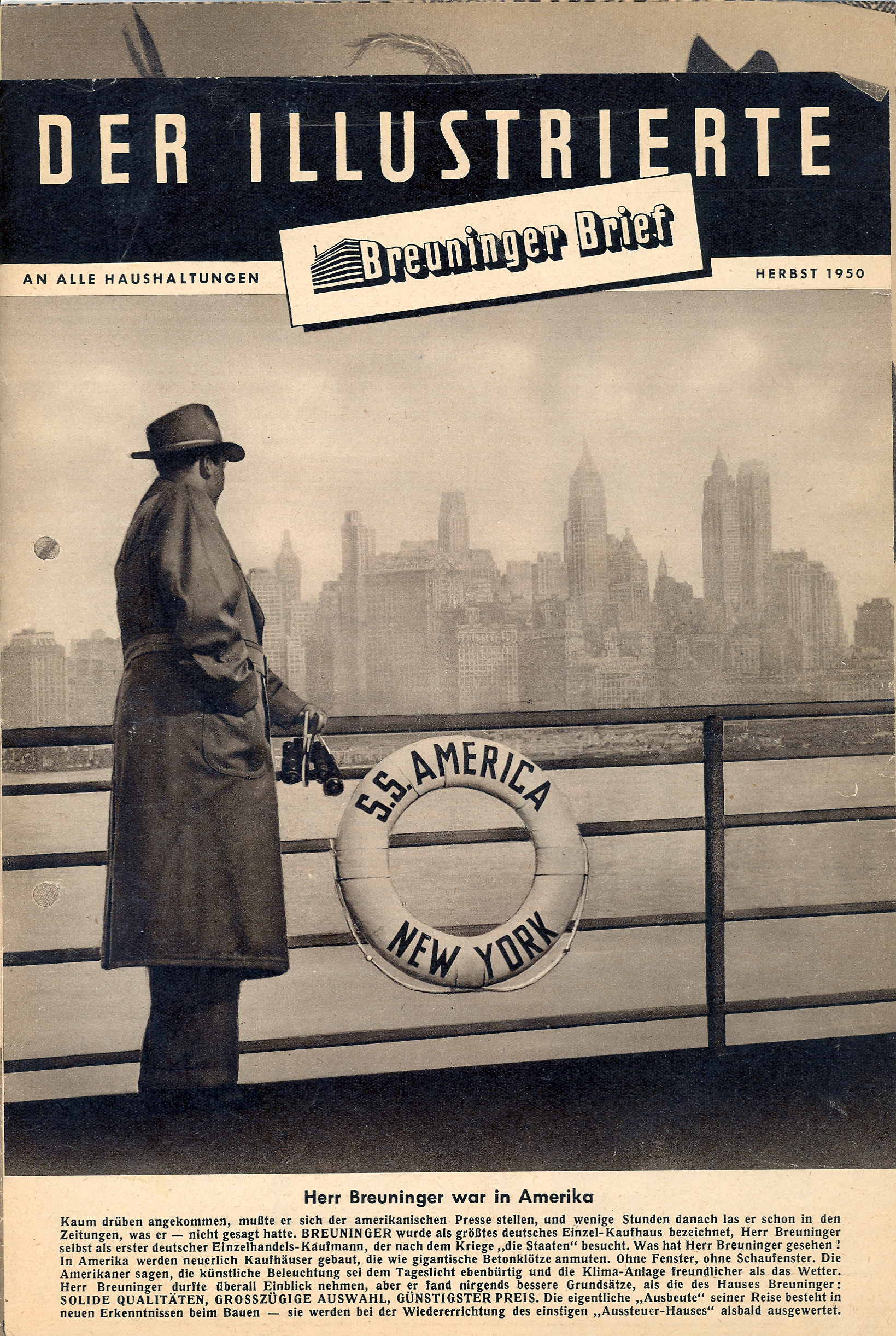 Реклама торгового дома "Бройнингер", 1950 год